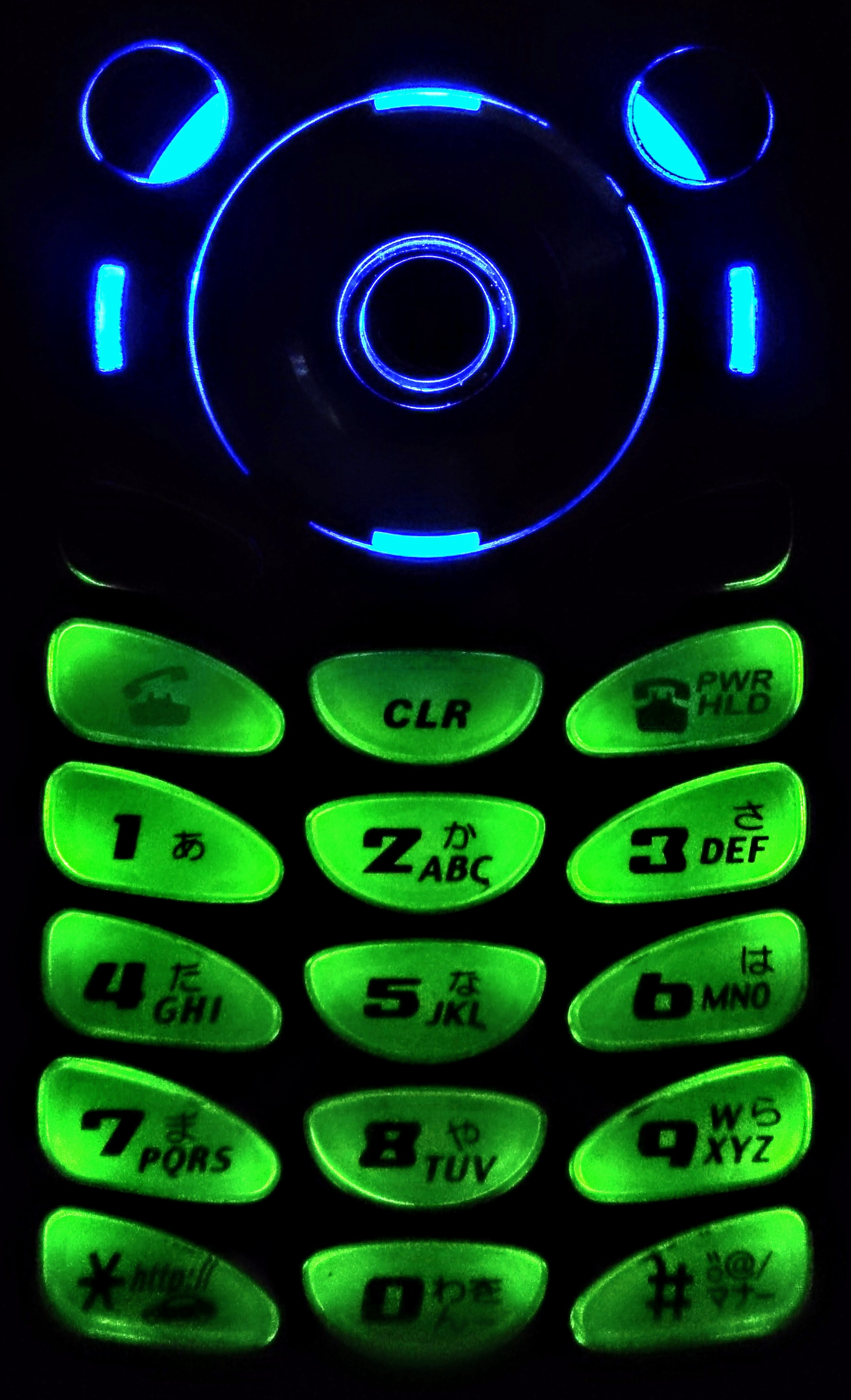 N2701のボタン操作部・テンキー部の照光方式は「面照光」である